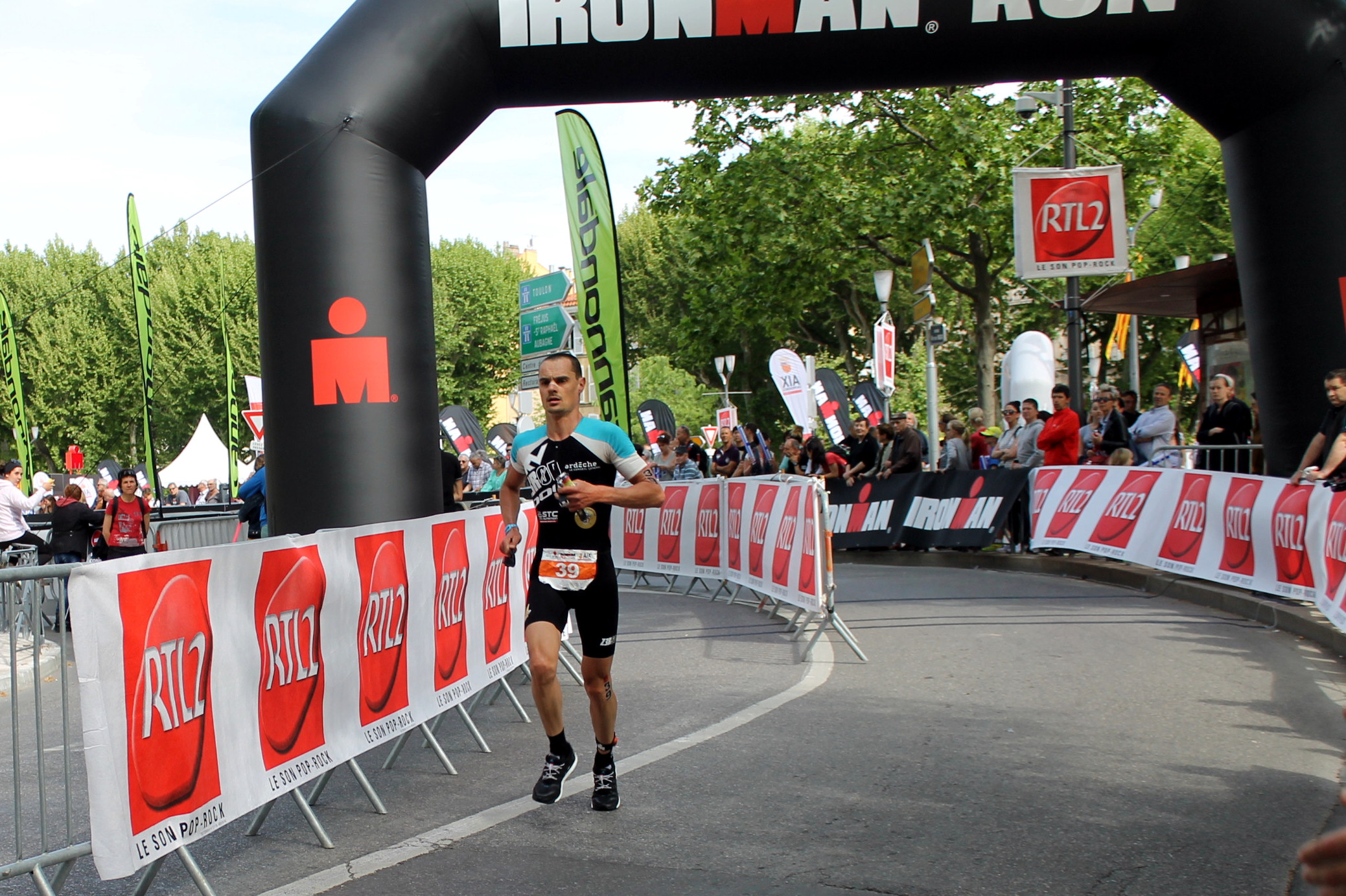 Ironman Pays d'Aix 2015